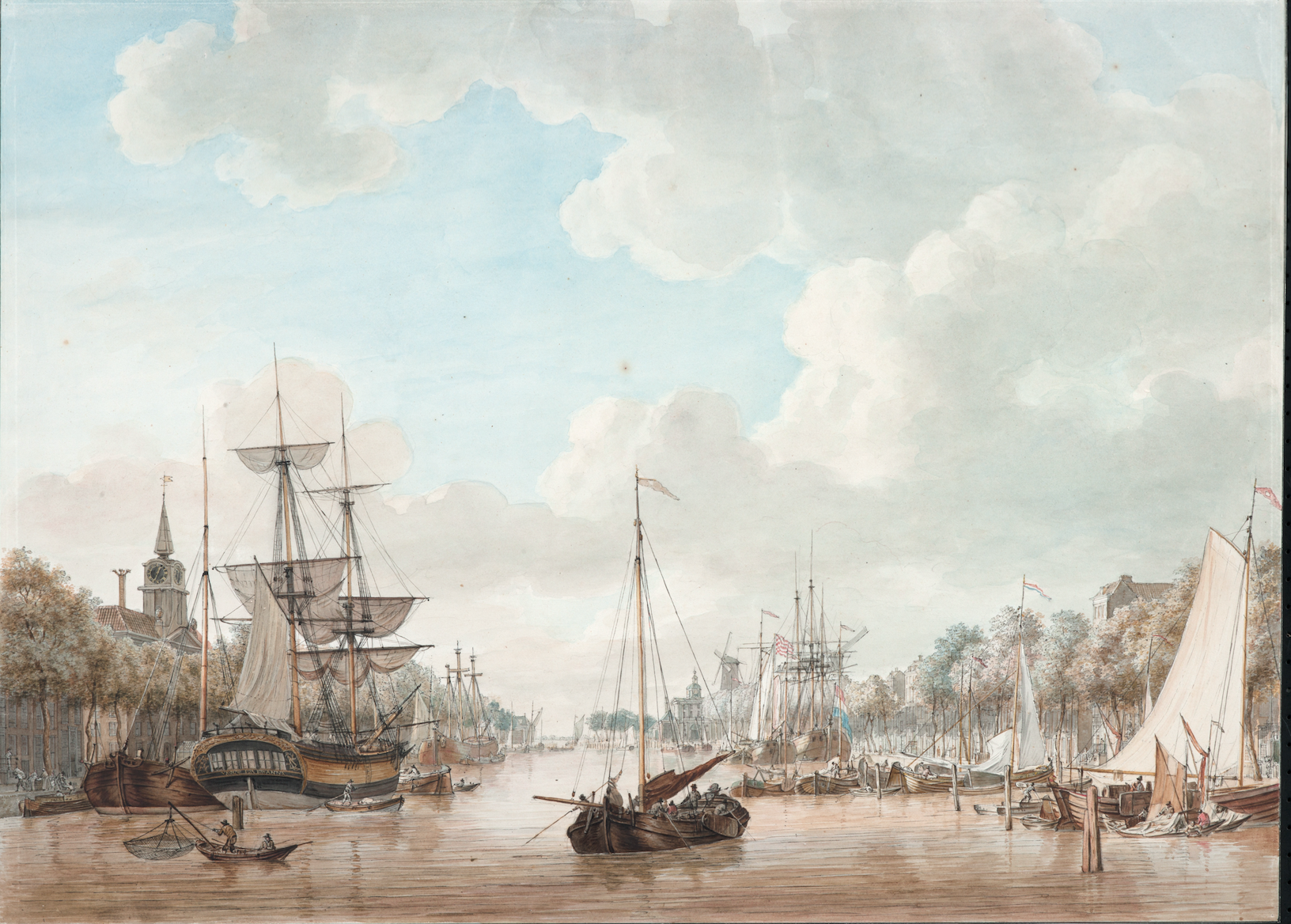 Het zuidelijk deel van de Leuvehaven gezien uit noordelijke richting. Links, met torentje, de brouwerij De Twee Witte Klimmende Leeuwen. Rechts de westzijde van de Leuvehaven. In de verte de Ooster en de Wester Nieuwehoofdpoort en molen De Pelikaan. Het schip links aan de kade draagt een naam `Ida Johanna’.